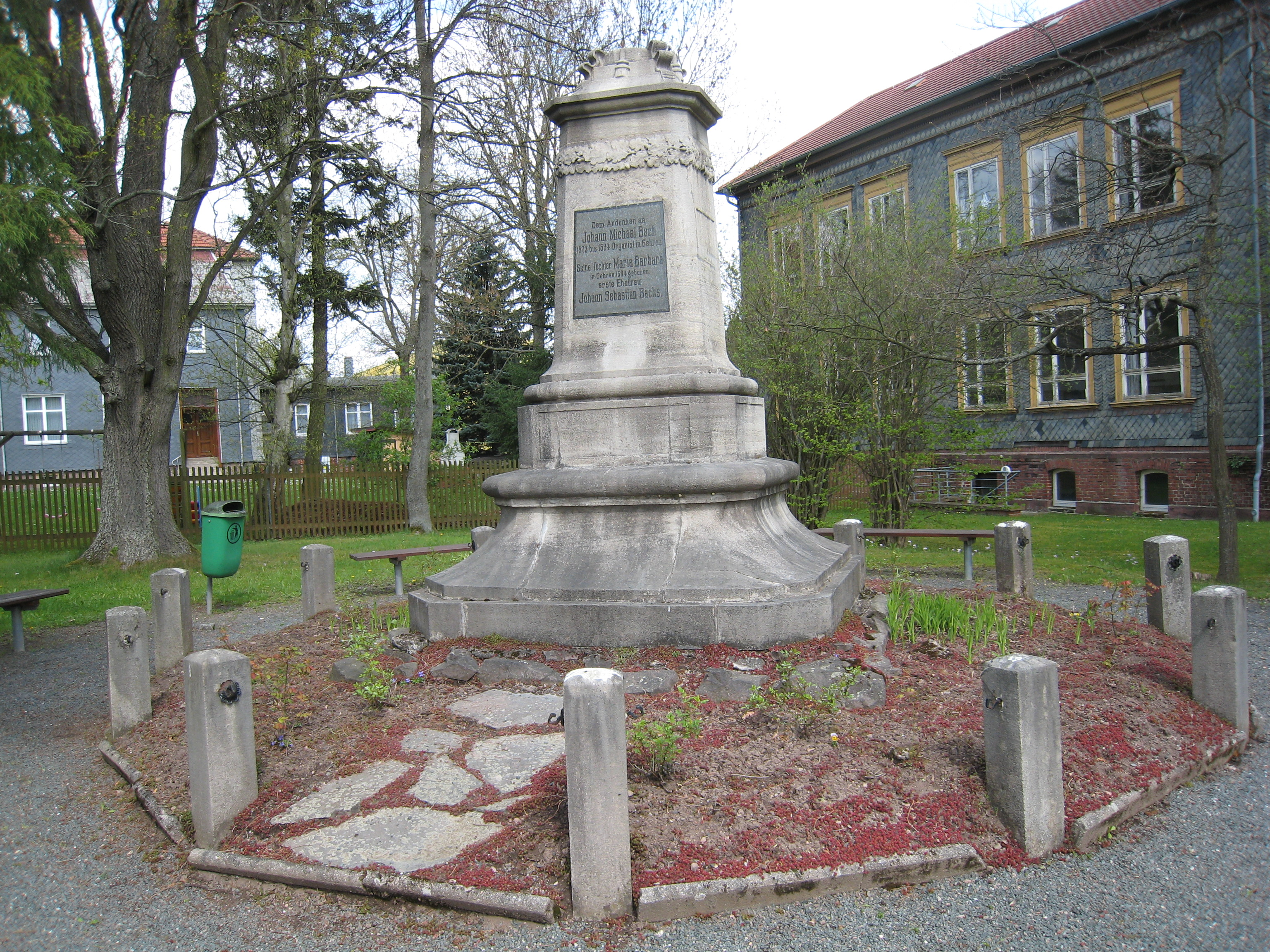 Bachdenkmal in Gehren.